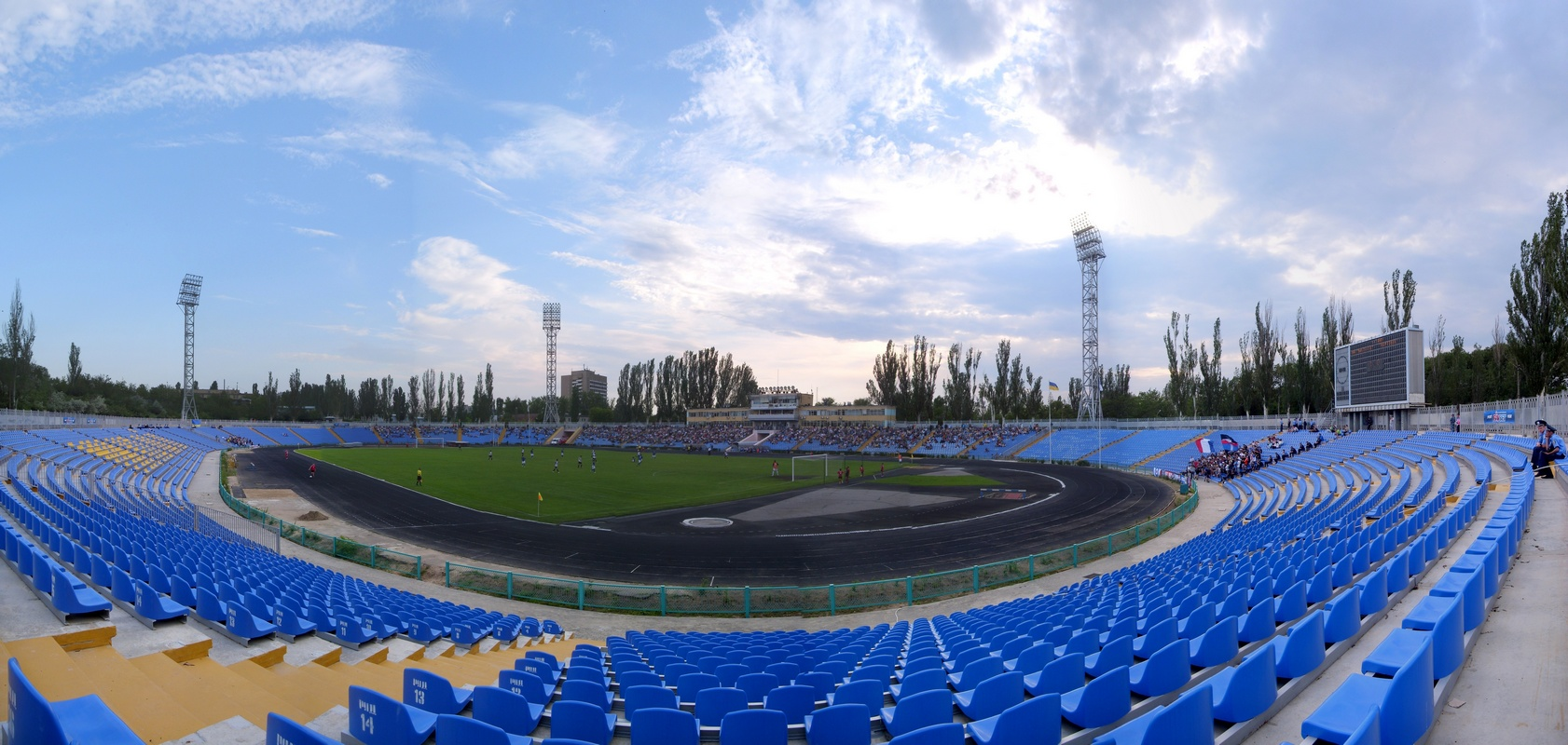 Миколаївська весна у Вікіпедії